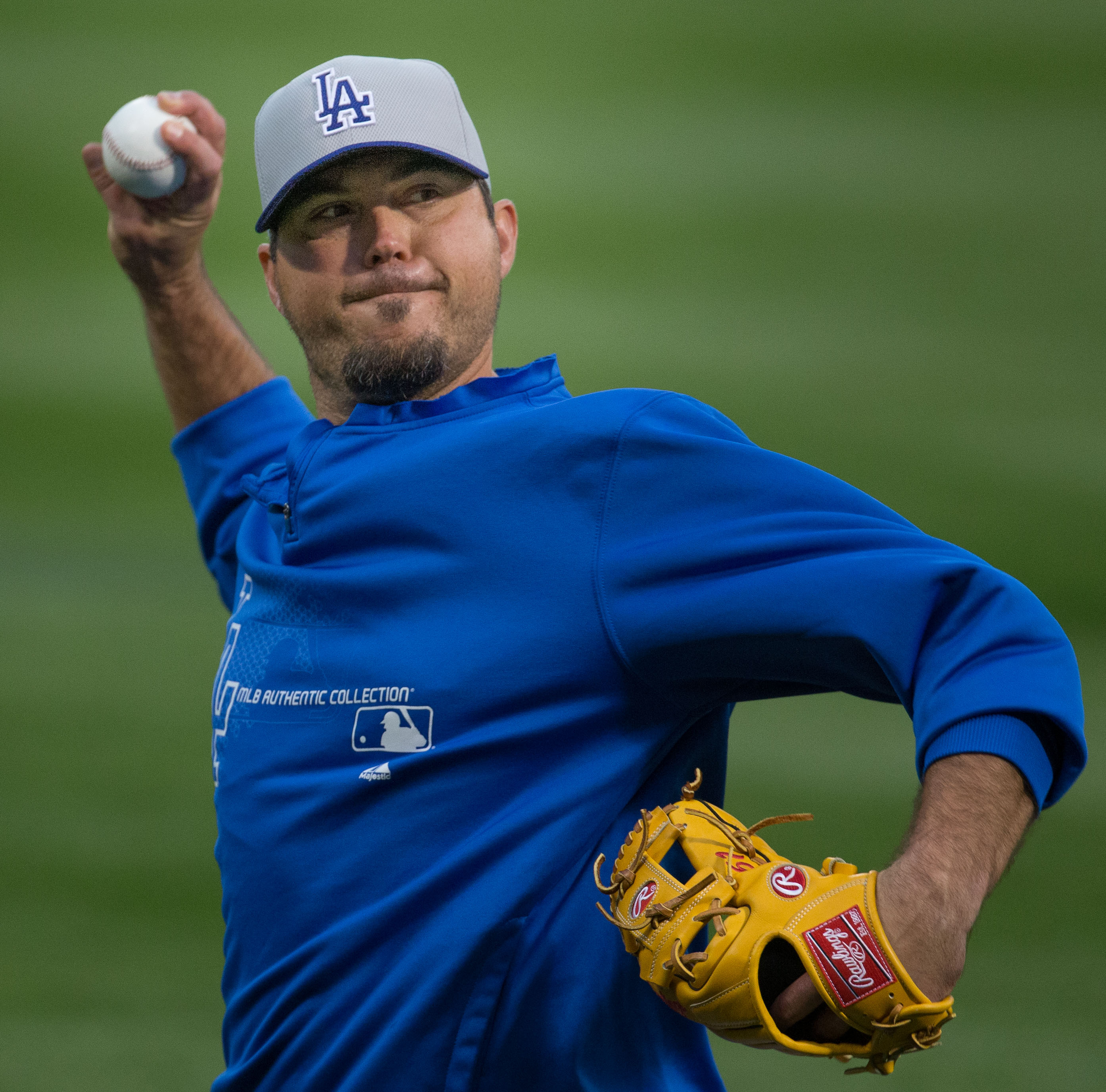 Josh Beckett